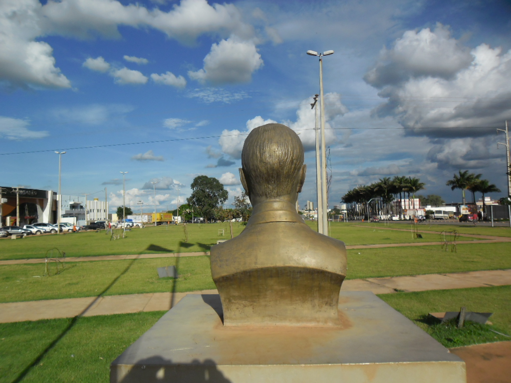 luis eduardo magalhaes - bahia